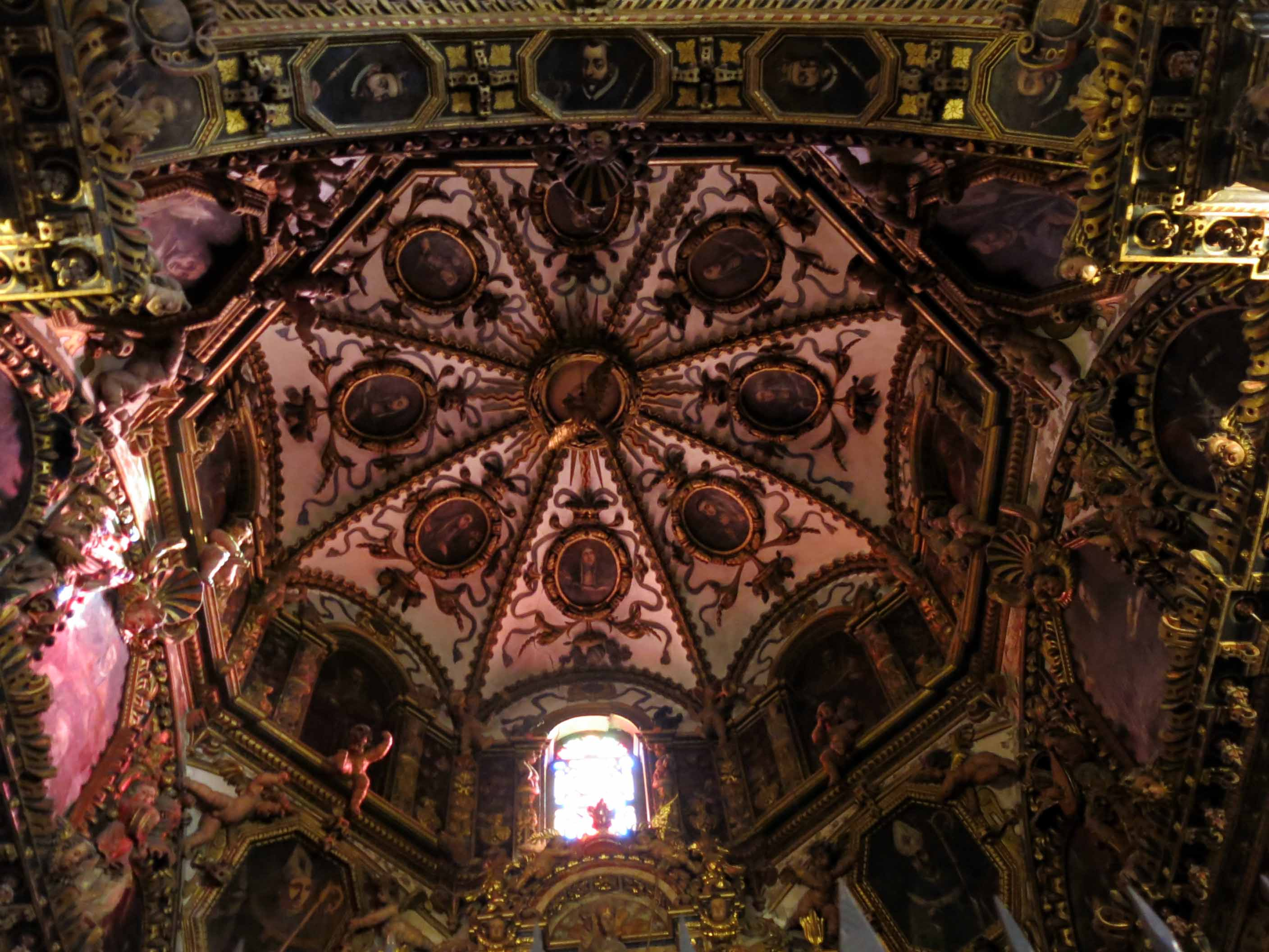 Monestir de Sant Cugat del Vallès